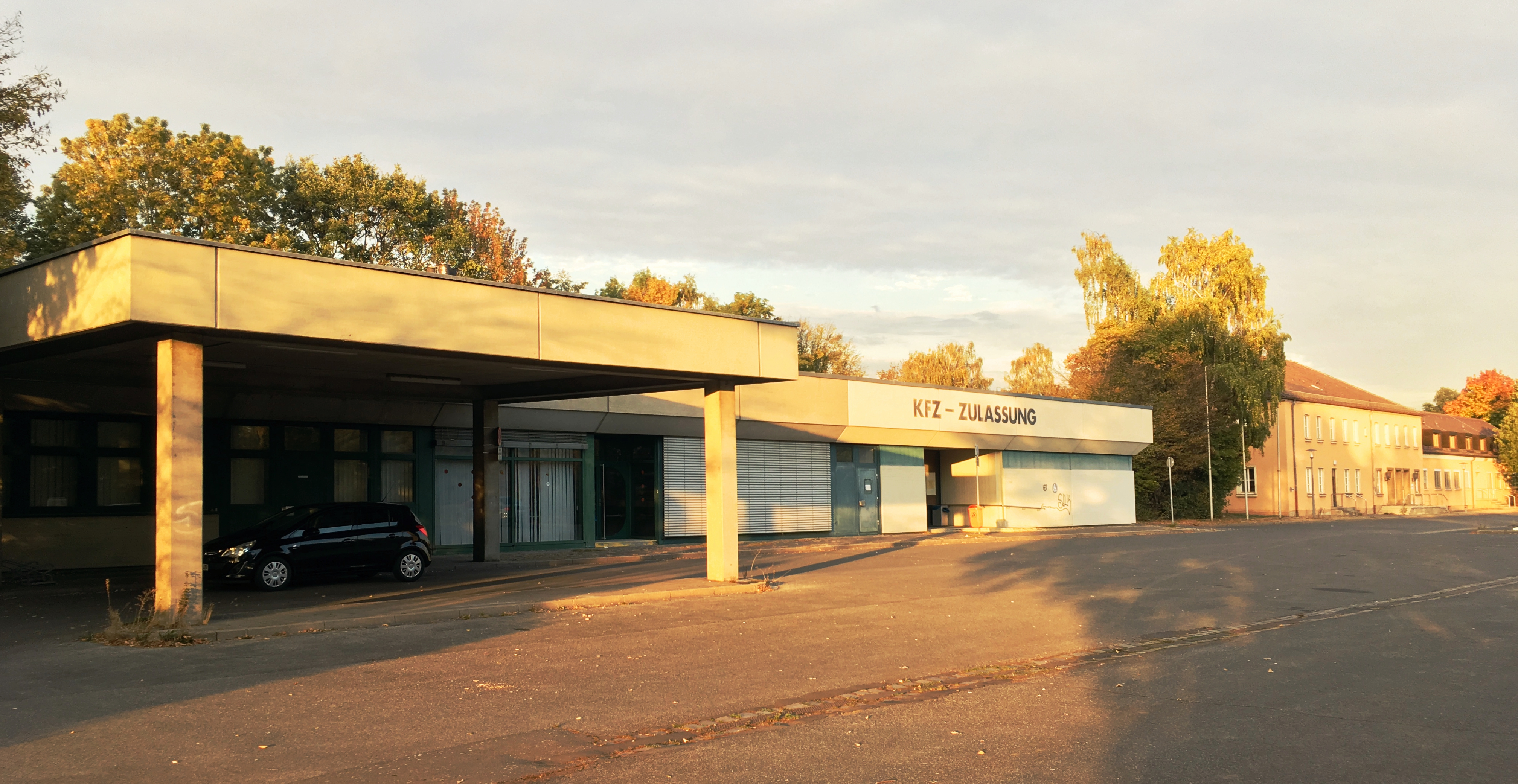 KFZ-Zulassungstelle auf dem Areal des ehemaligen